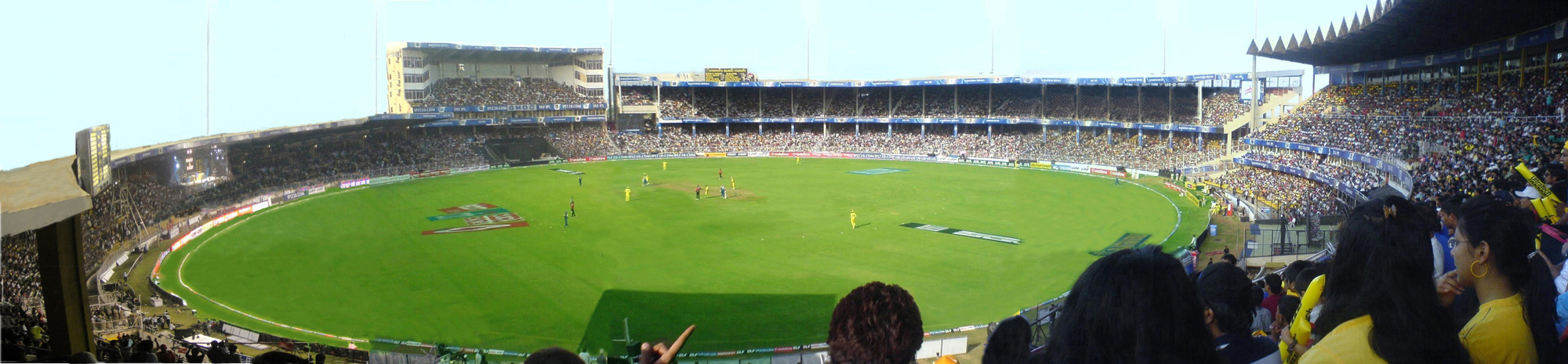 IPL T20 Match: Rajasthan Royals Vs Chennai Super Kings at Sardar Patel Gujarat Stadium, Ahmedabad